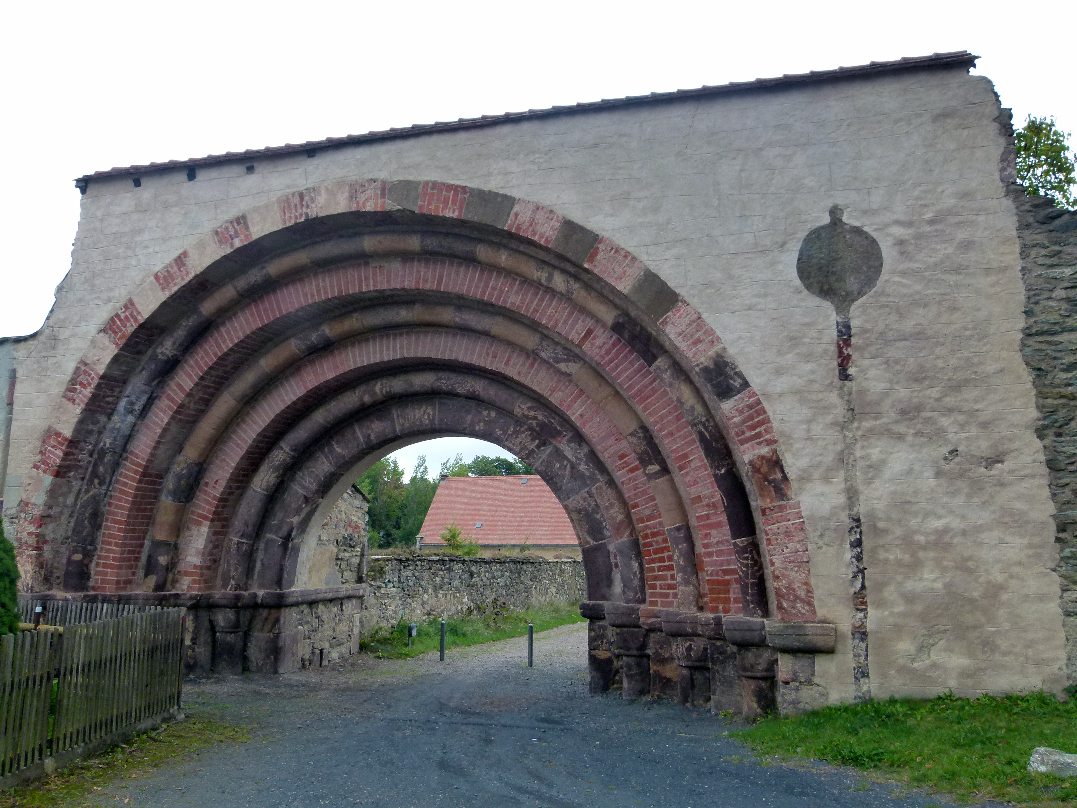 Klosterpark Altzella, Sachsen